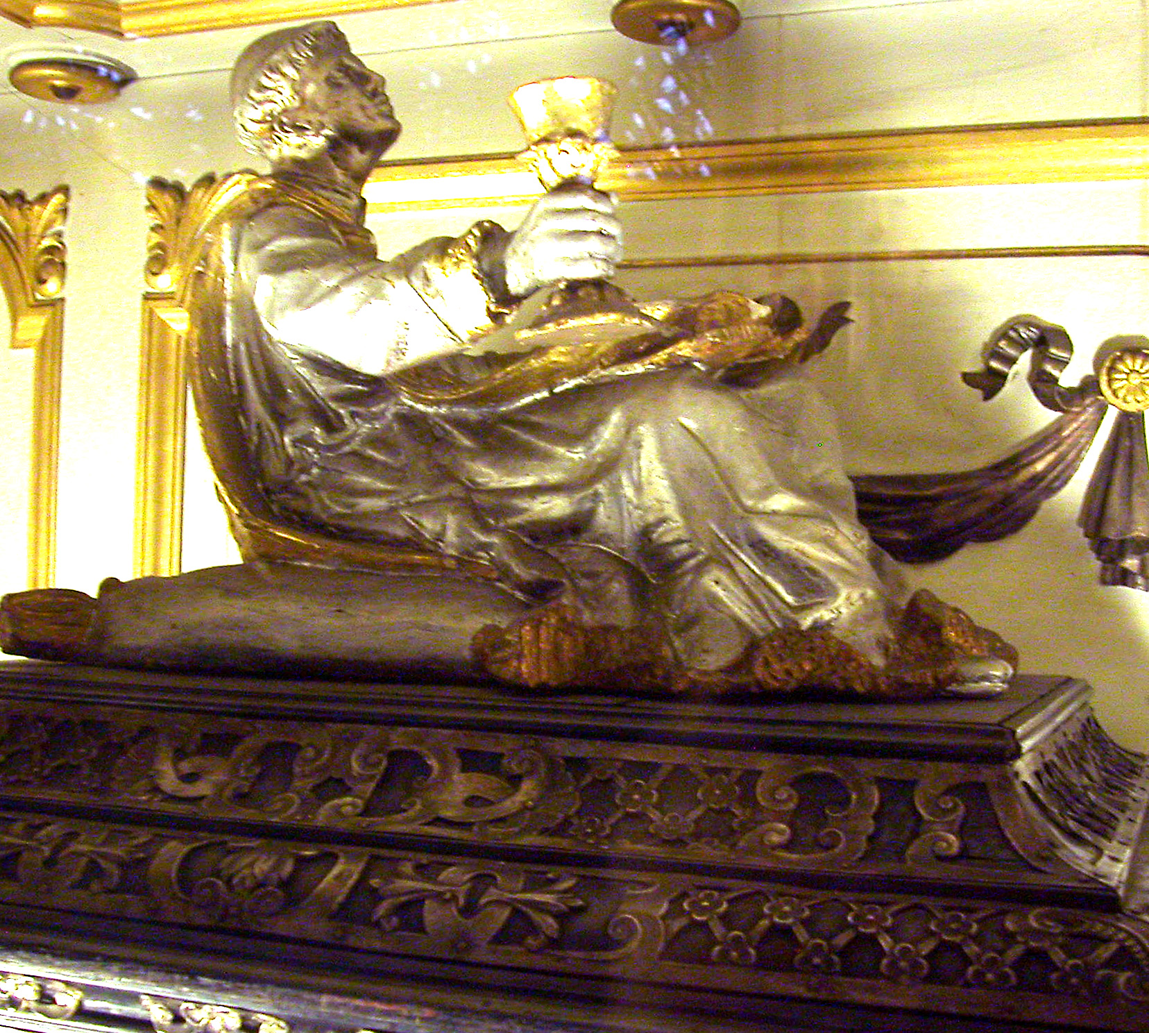 Hl. Willeic, Düsseldorf, Deutschland